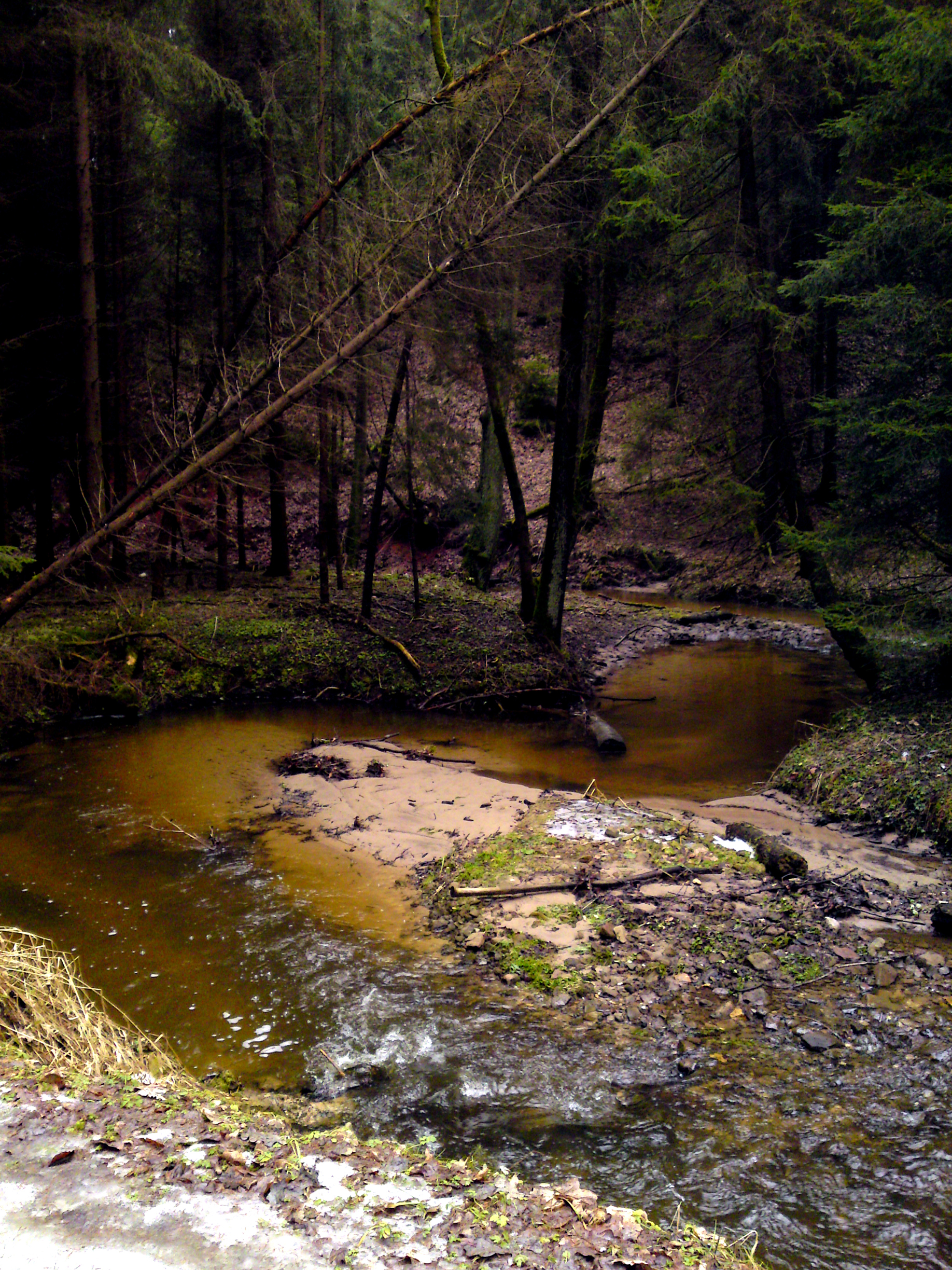 Zeitzbach im Zeitzgrund